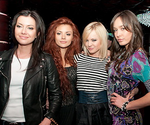 Группа «Тутси» на на шоу-показе в клубе «РАЙ». 2011 год.